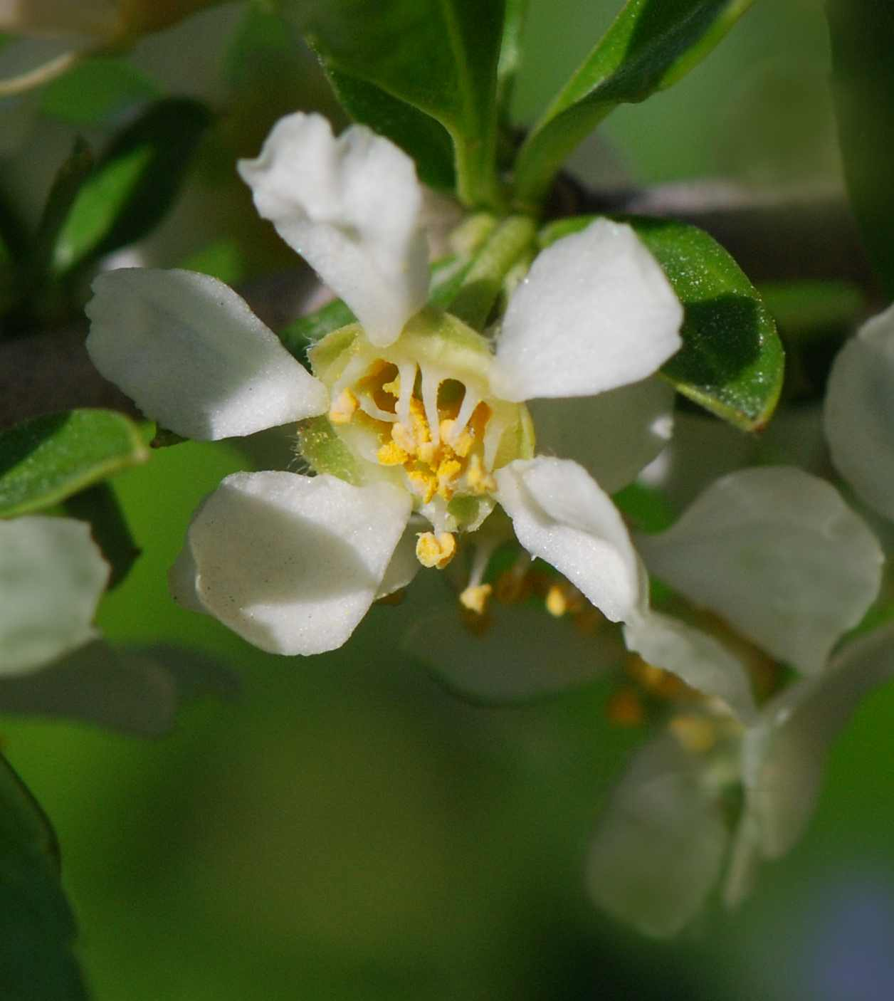 Prinsepia uniflora, fleur, Jardin des Plantes de Paris